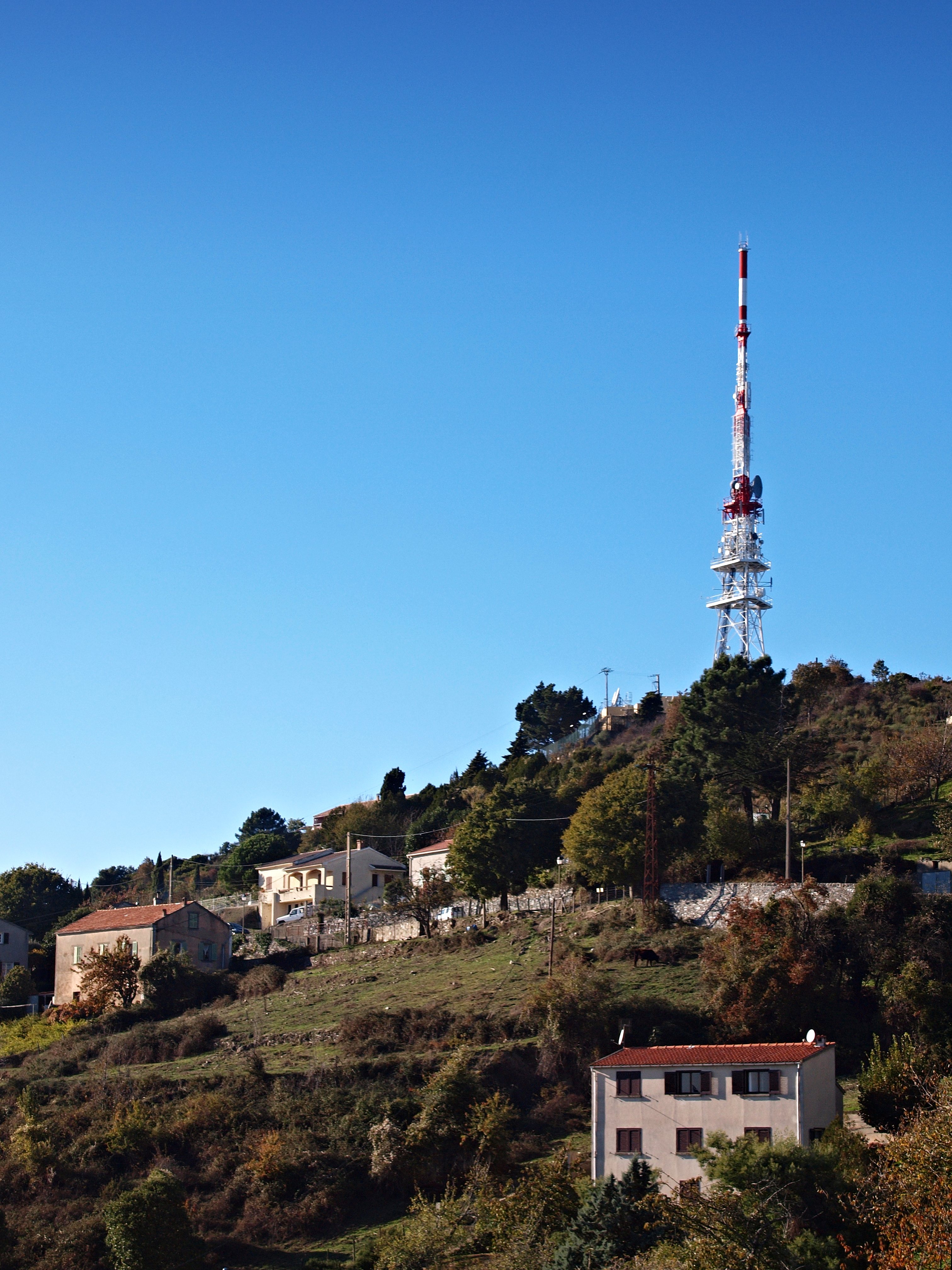 Antisanti (Corsica) - Pylône des télécommunications implanté au sommet d'un piton rocheux à 737 m d'altitude